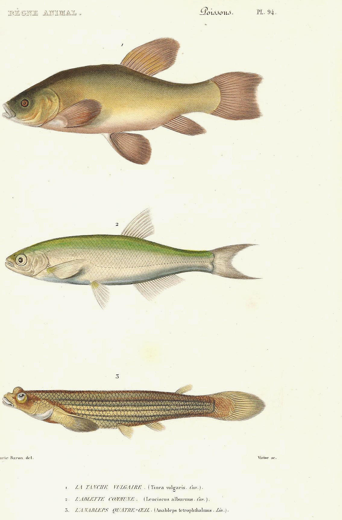 Planche N° 94 du livre "Le règne animal distribué d'après son organisation" par Georges Cuvier (Tome 8), seconde édition de 1828, représentant : -en haut : Tinca fluviatilis -au milieu : Cyprinus alburnus -en bas : Anableps tetrophthalmus